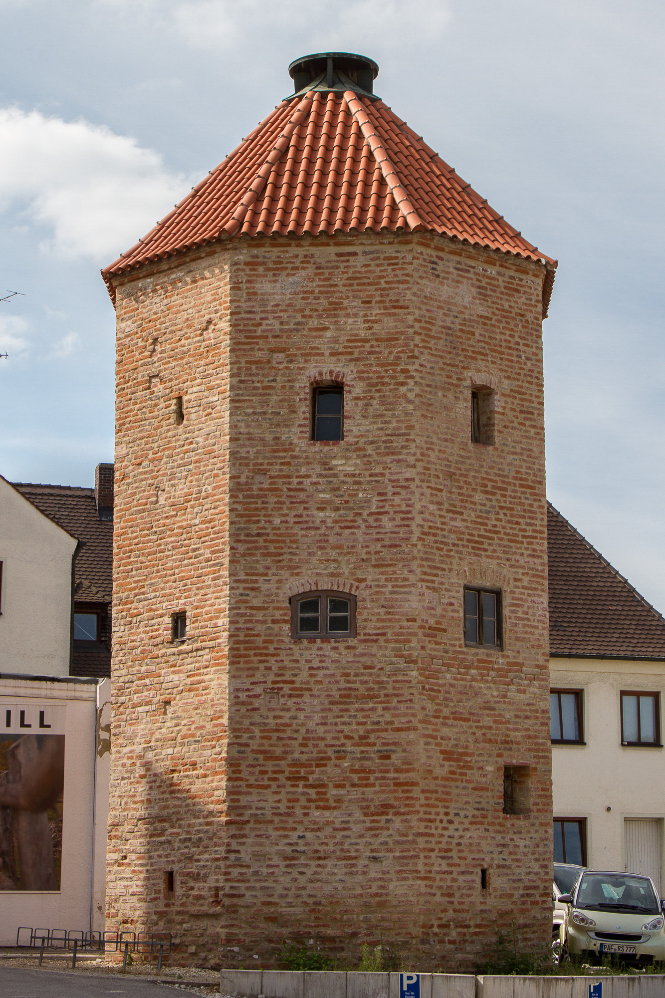 "Pfänderturm"; östlich hinter dem Haus polygonaler Backsteinturm der Stadtbefestigung, 15. JahrhundertThis is a photograph of an architectural monument.